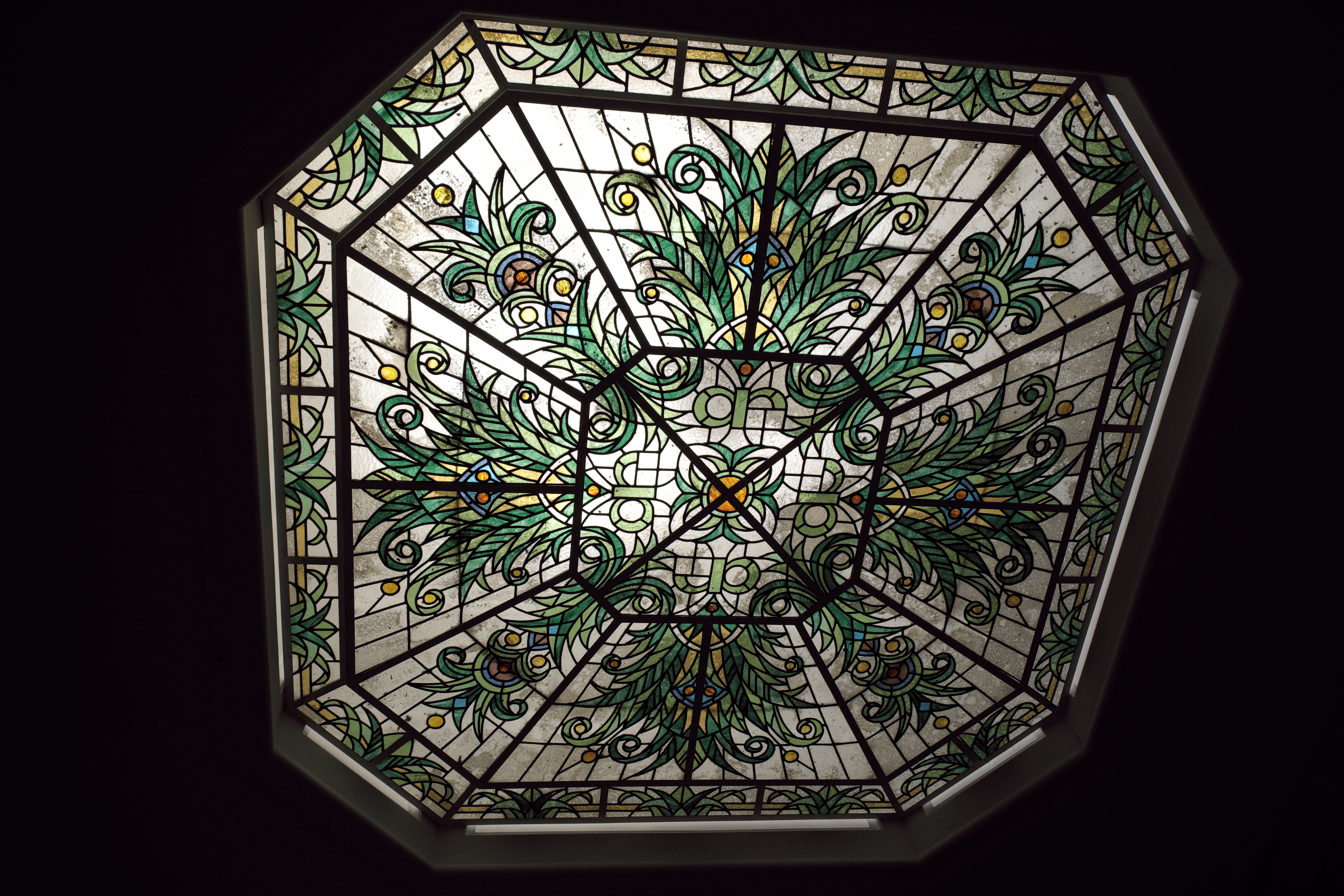 Casino de Zamora in Zamora (Kastilien-León/Spanien), von Miguel Mathet y Coloma, von 1905, Bleiglasfenster